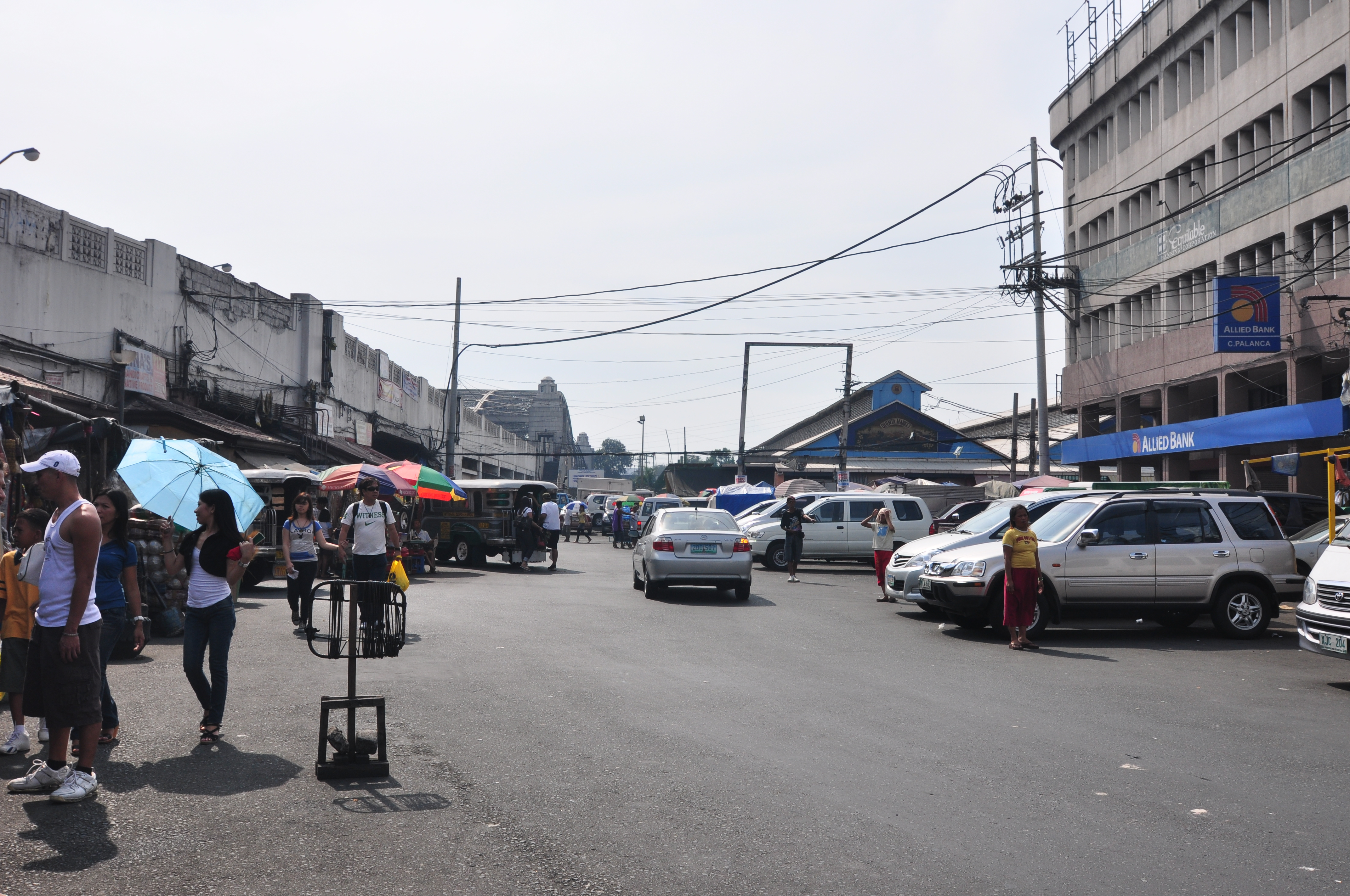 Quinta Market in Manila, Philippines